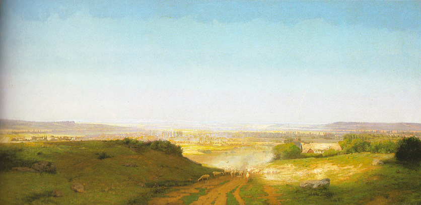 L'Espace